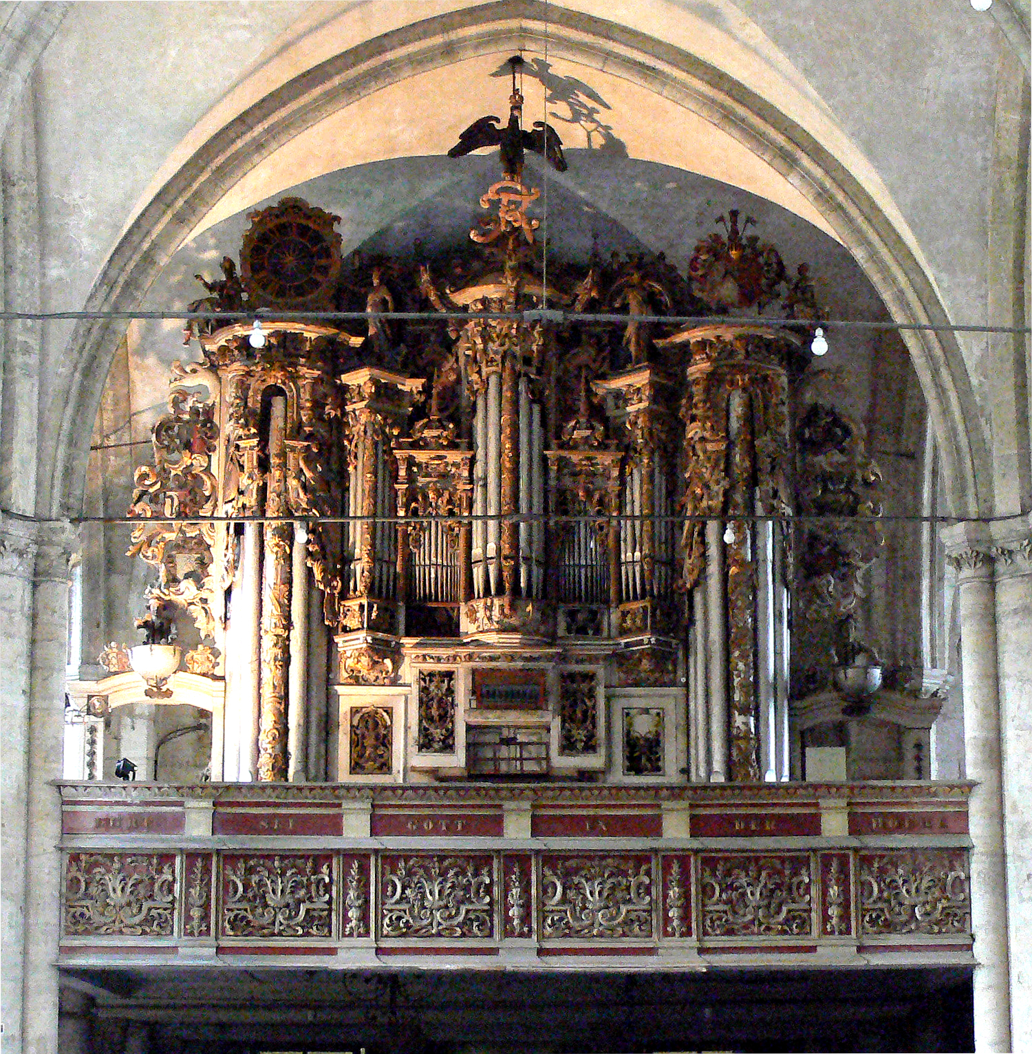 Orgel von St. Martini in Halberstadt